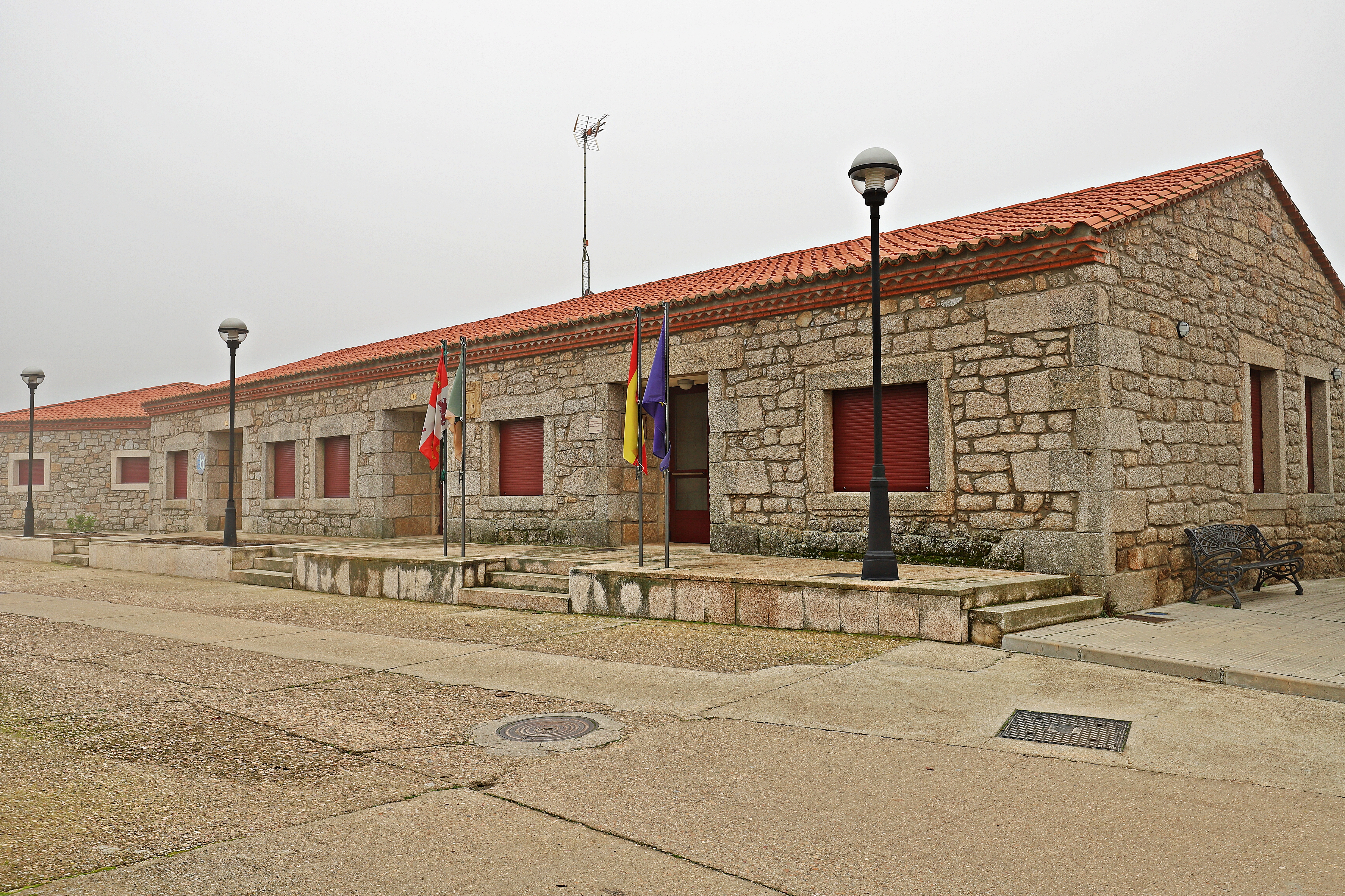 Moralina, municipio de la comarca de Sayago, en la provincia de Zamora